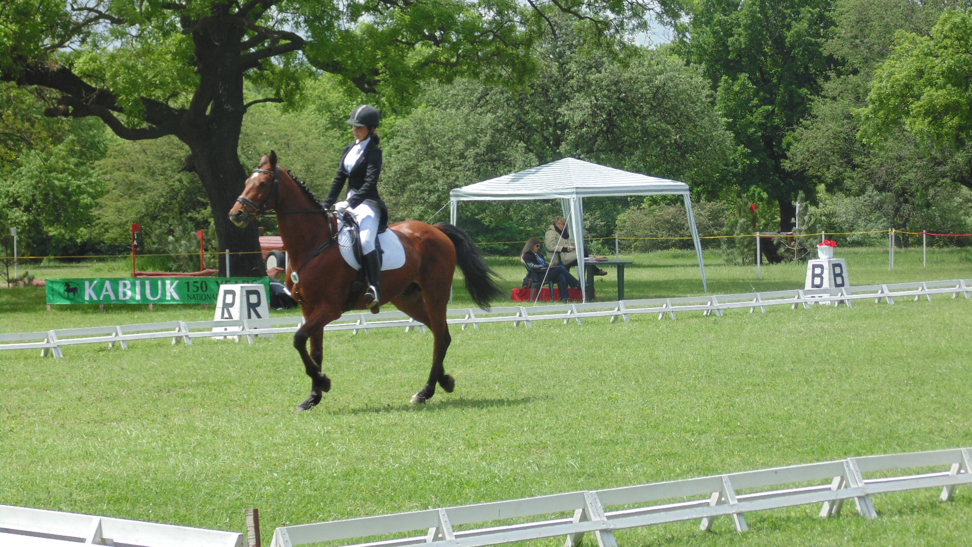 Турнир в Кабиюк по случай 150 годишнината от основаването му.